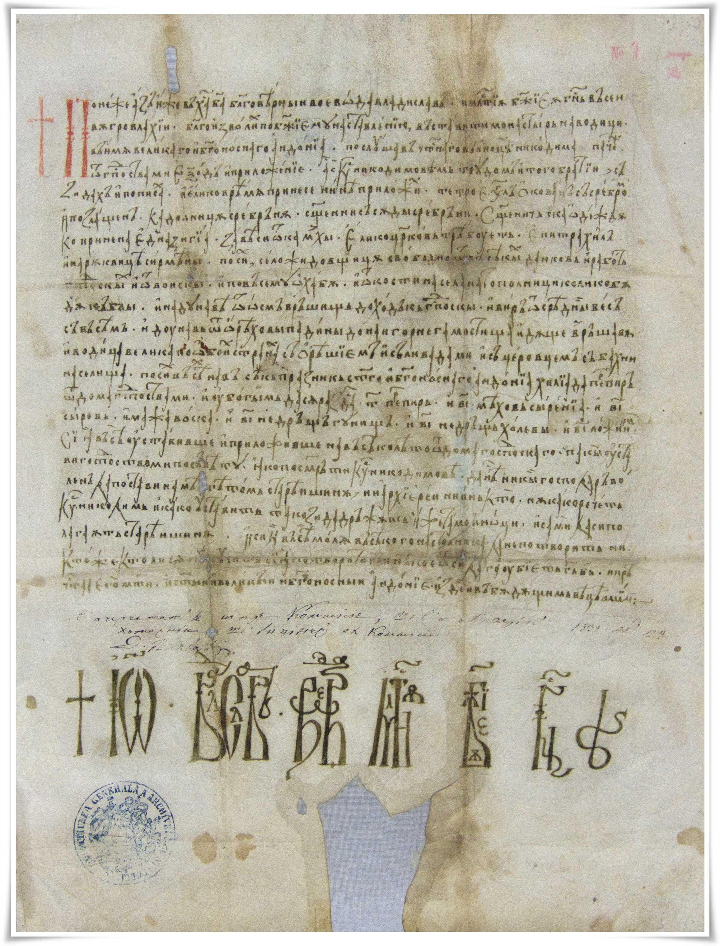 Cel mai vechi document din Țara Românească, prin care Vladislav-Vlaicu întărește mai multe sate Mănăstirii Vodița.